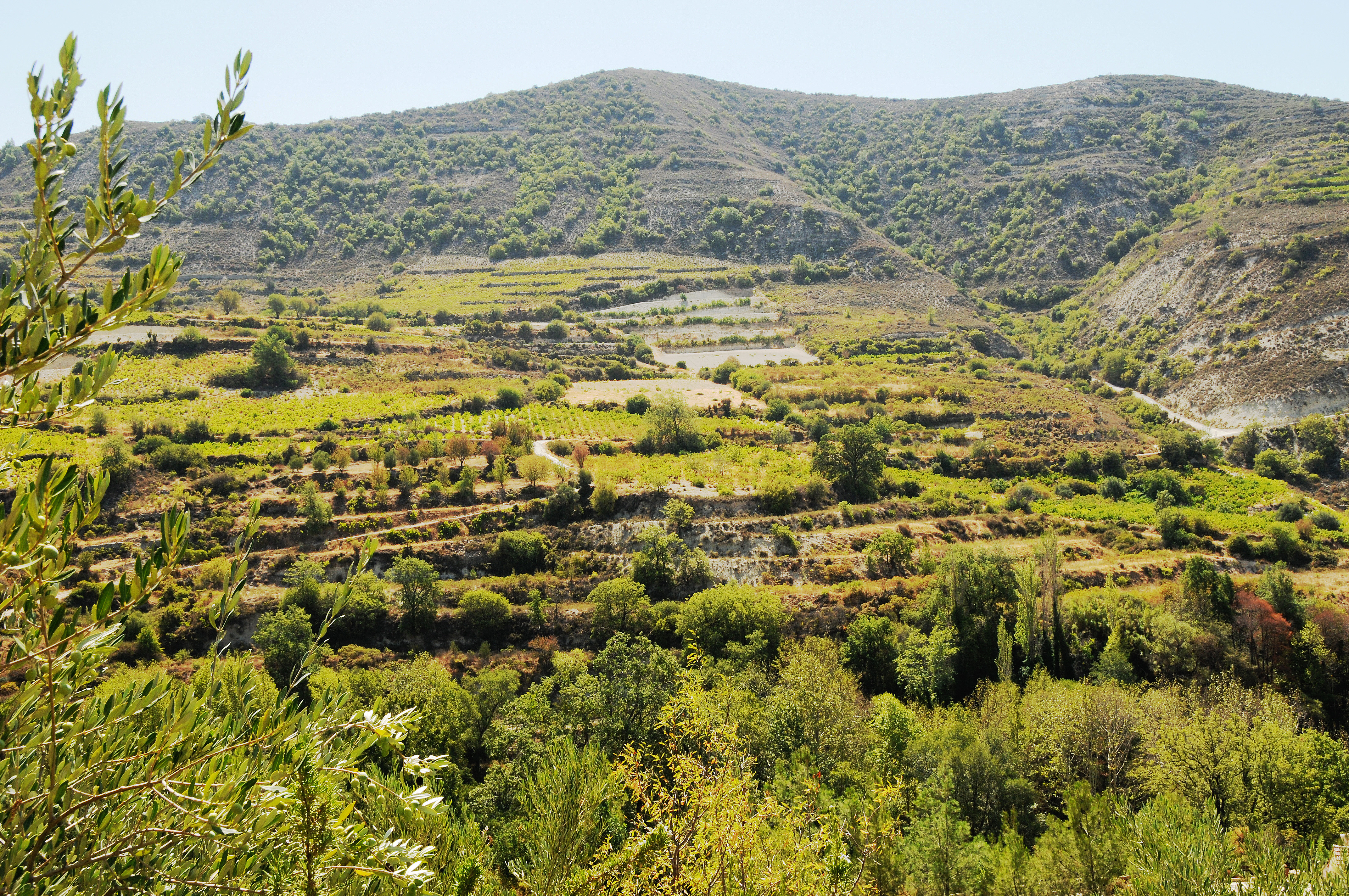 Parcellaire du vignoble de Silikou